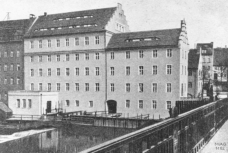 Original image description from the Deutsche Fotothek Görlitz. Dreiradenmühle, aus: Die Mühle vom 23.6.1927